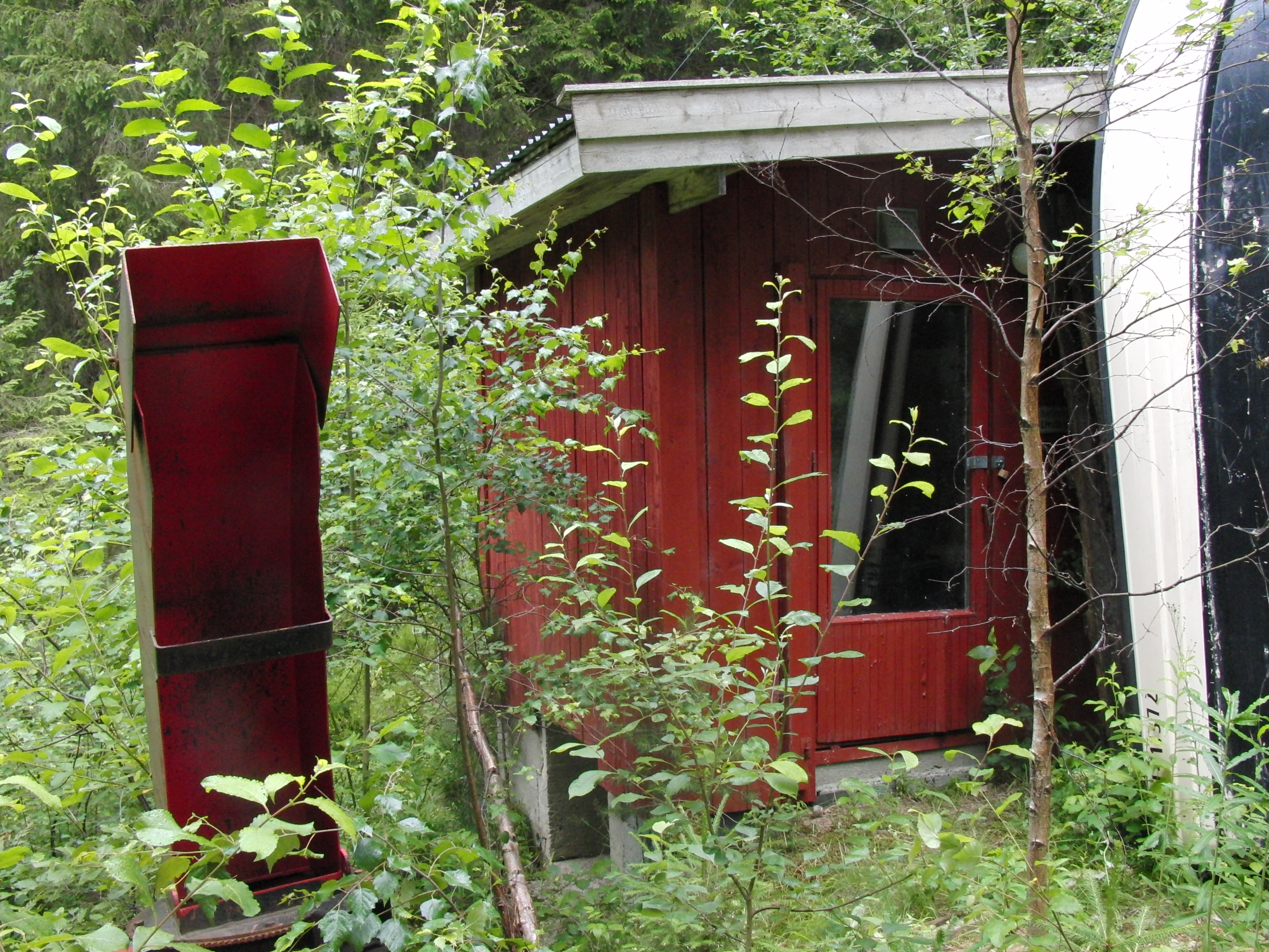 Haavard T. Lien mikrokraftverk